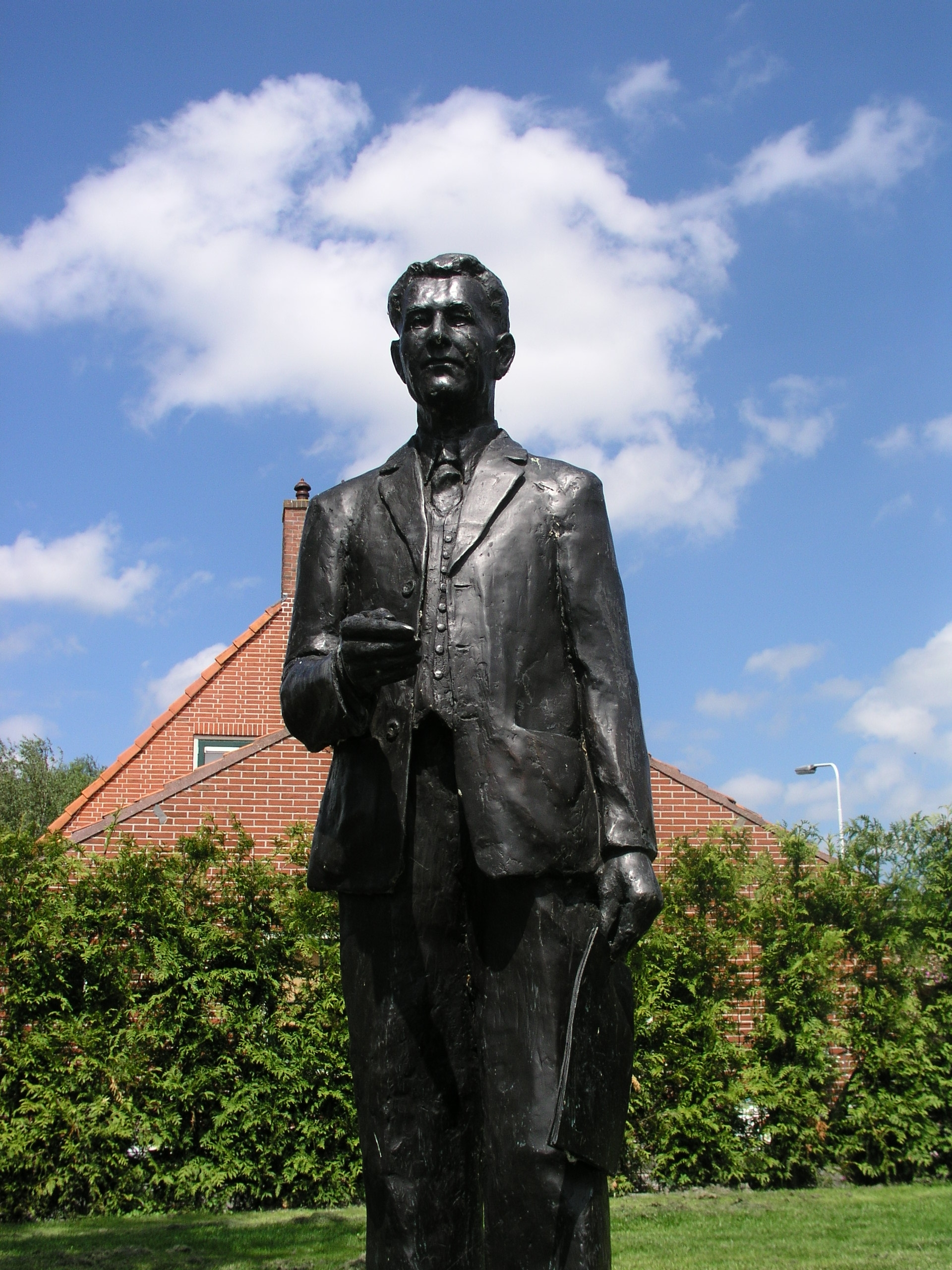 Standbeeld in Damwoude, vervaardigd in 1999 door Frans Ram. Standbeeld bevind zich in de publieke ruimte.